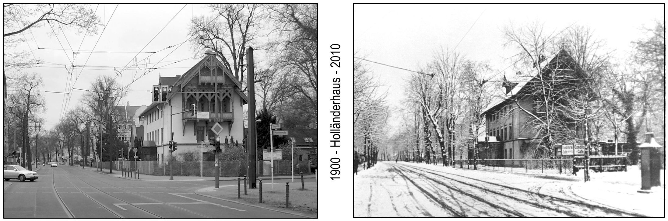 Ansichten des Holländerhauses im Vergleich - 1900 und 2010